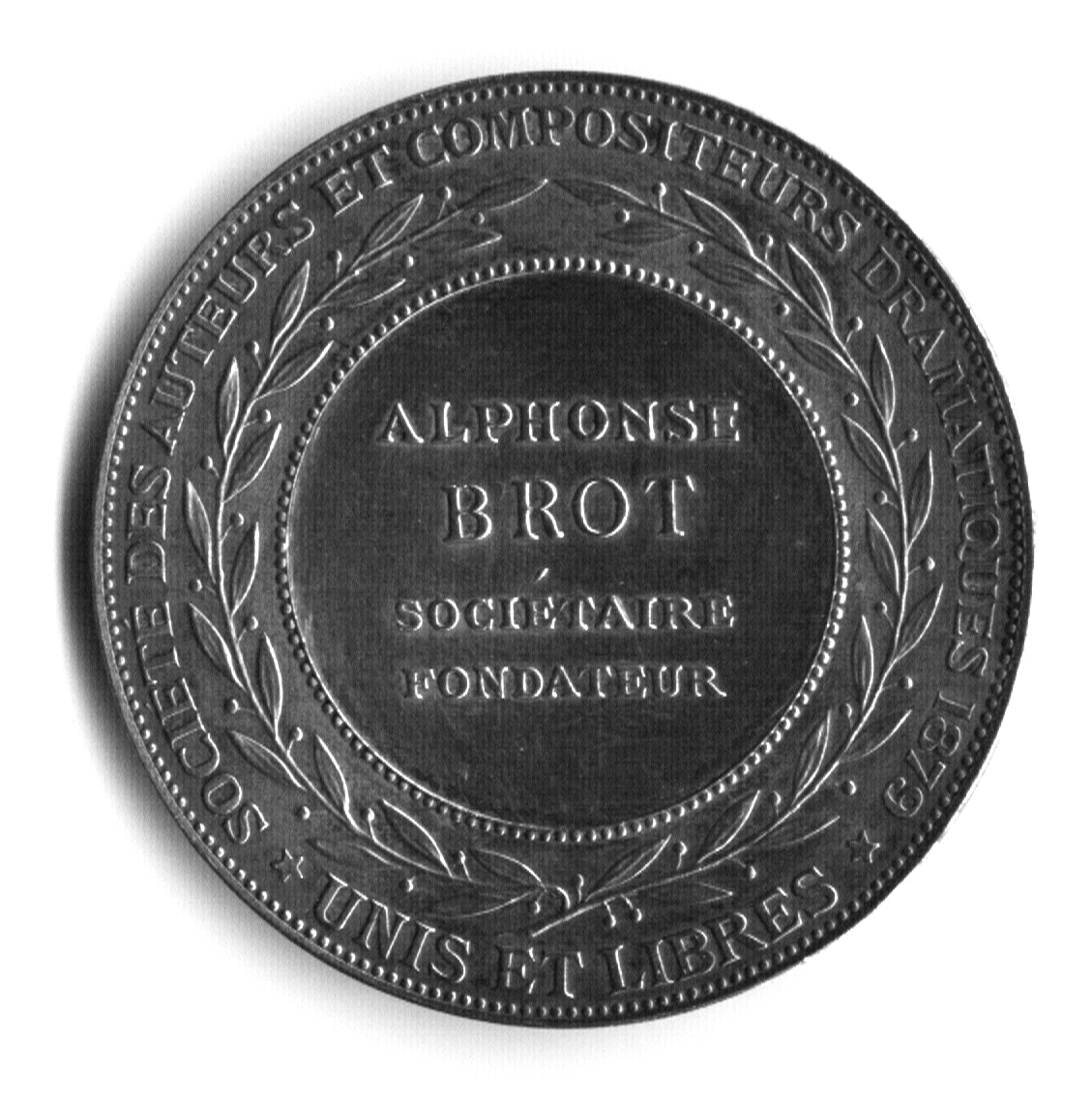 Photo Medaille SACD